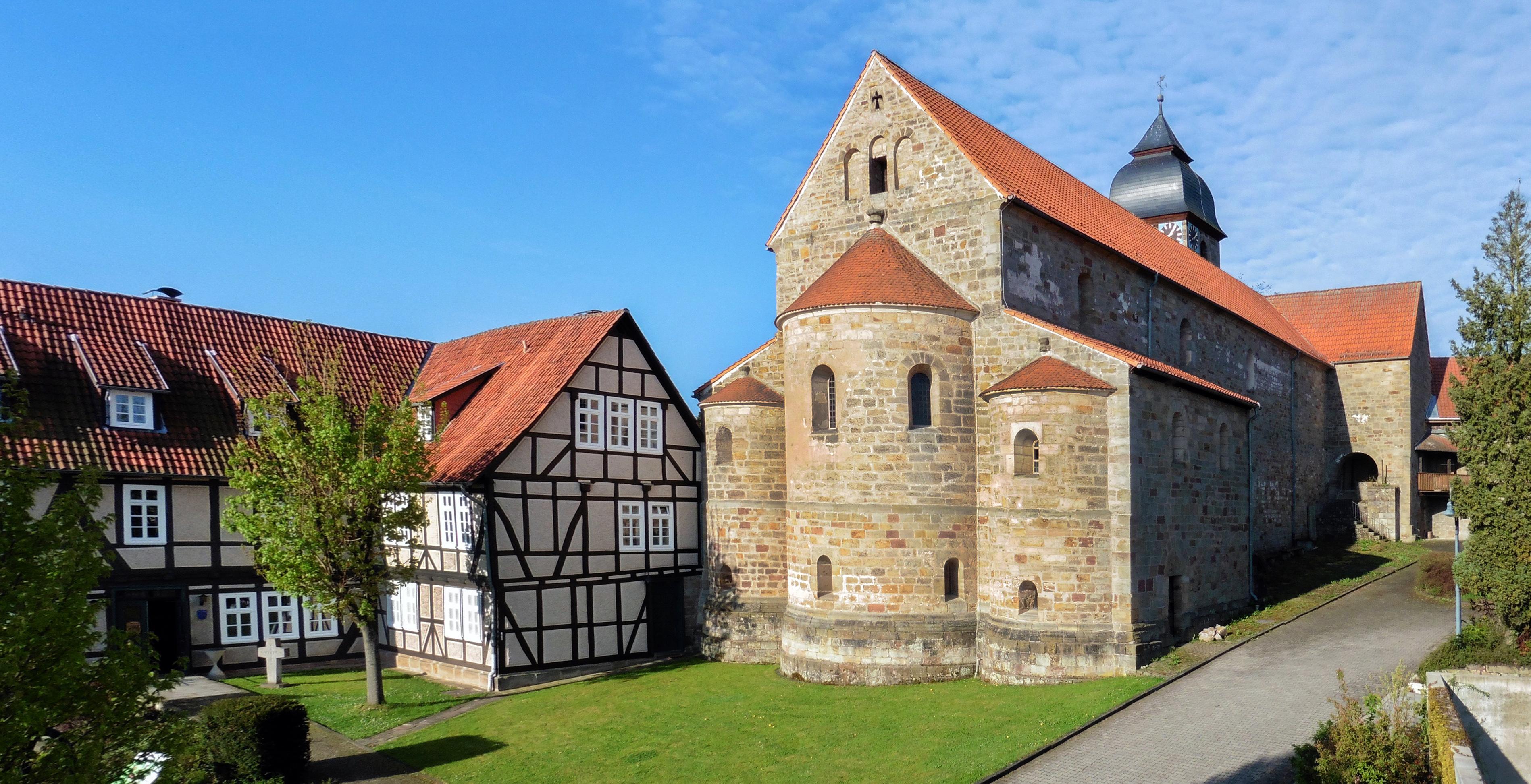 Ehemaliges Kloster Germerode mit Torhaus in der Gemeinde Meißner im Werra-Meißner-Kreis, Nordhessen. Ansicht von Nordosten.